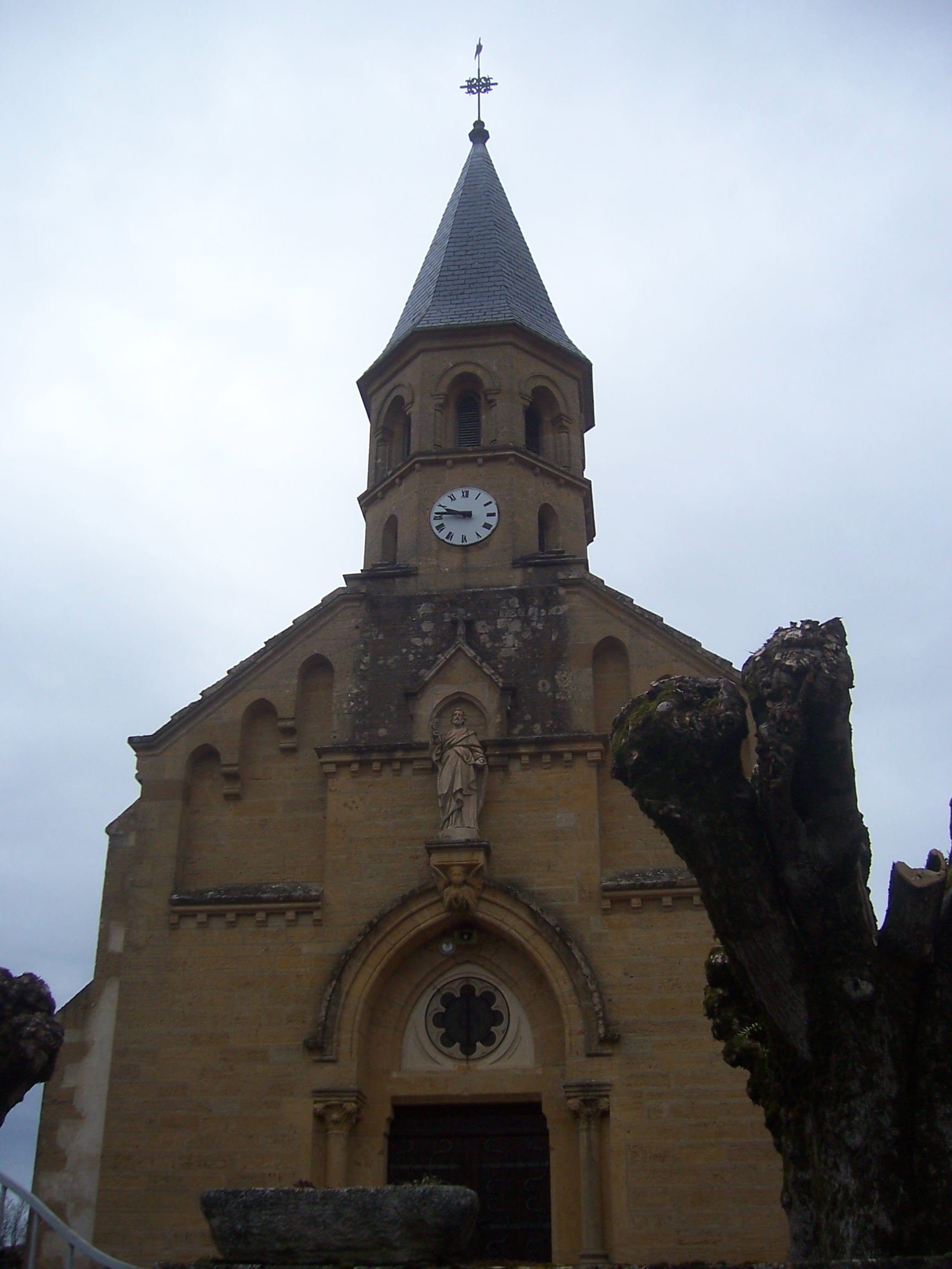 Eglise d'Ouroux-sous-le-Bois-Sainte-Marie